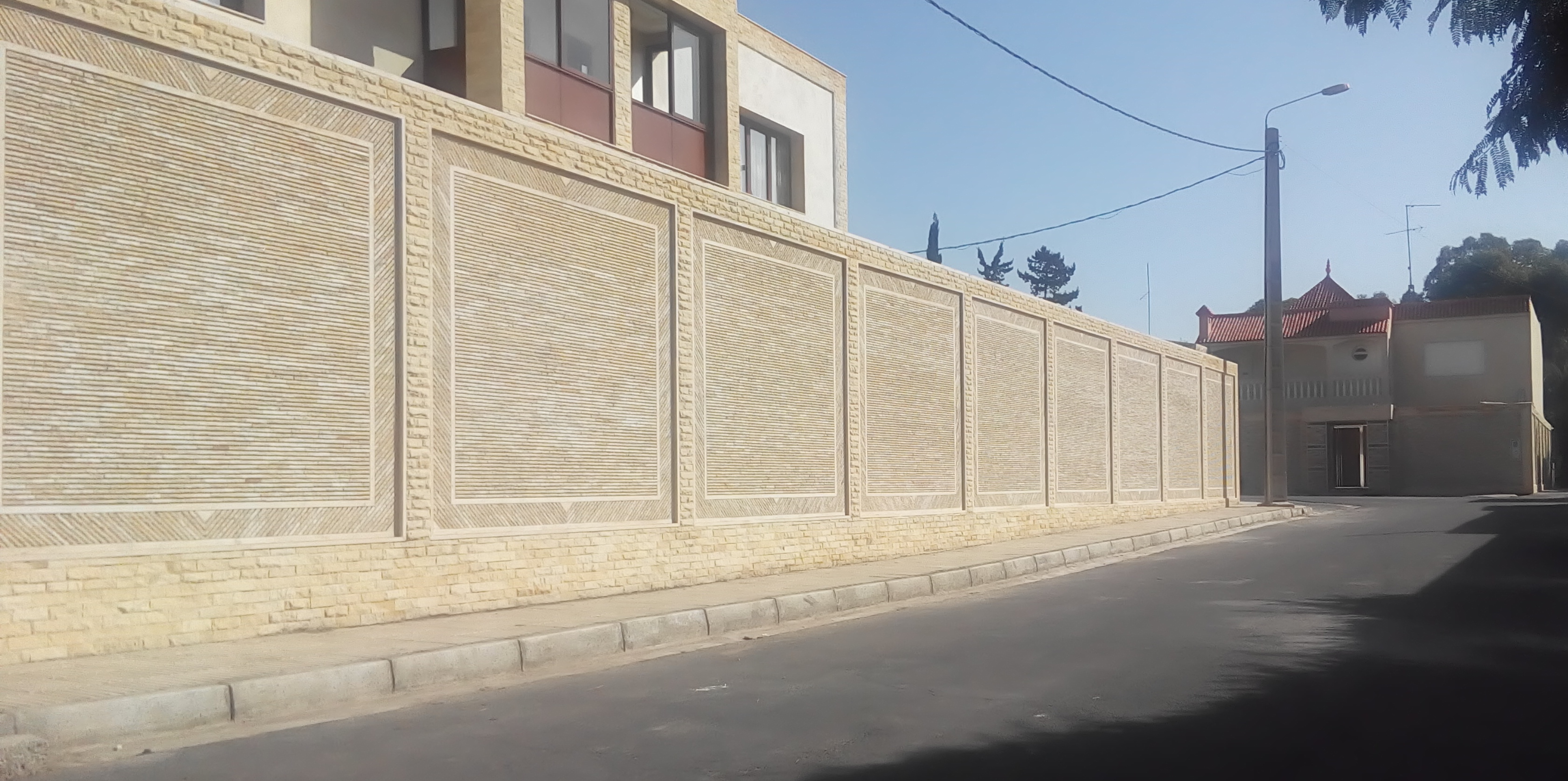 Agadir (2017), Schweizer Viertel (Fassade)